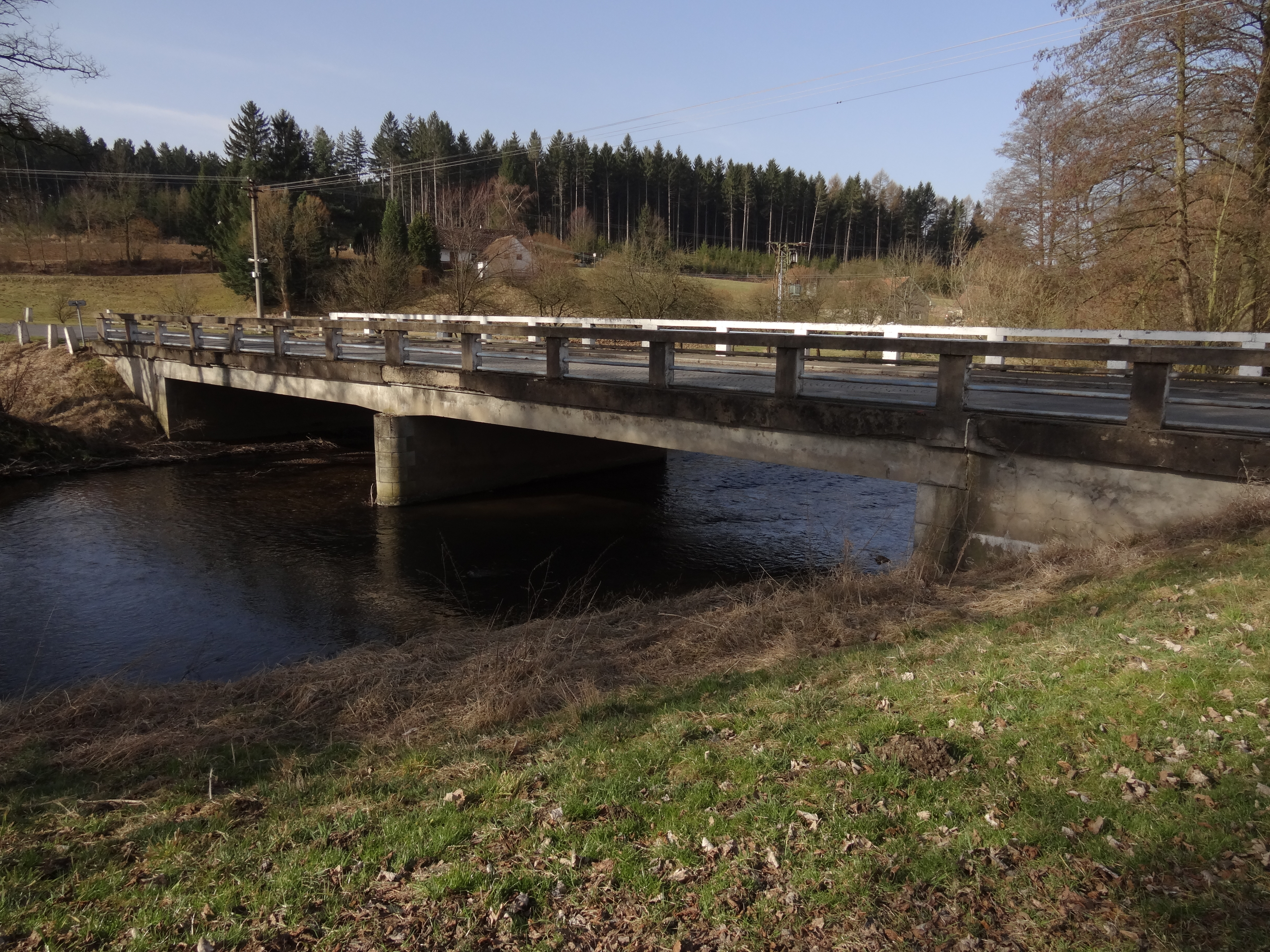 Jeřišno - most přes Doubravu